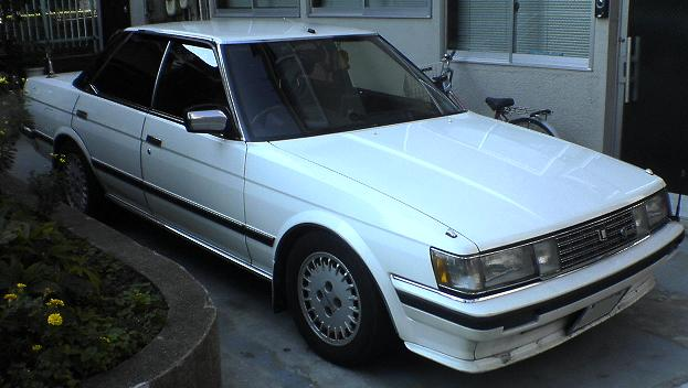 Toyota MarkII Grande 1984